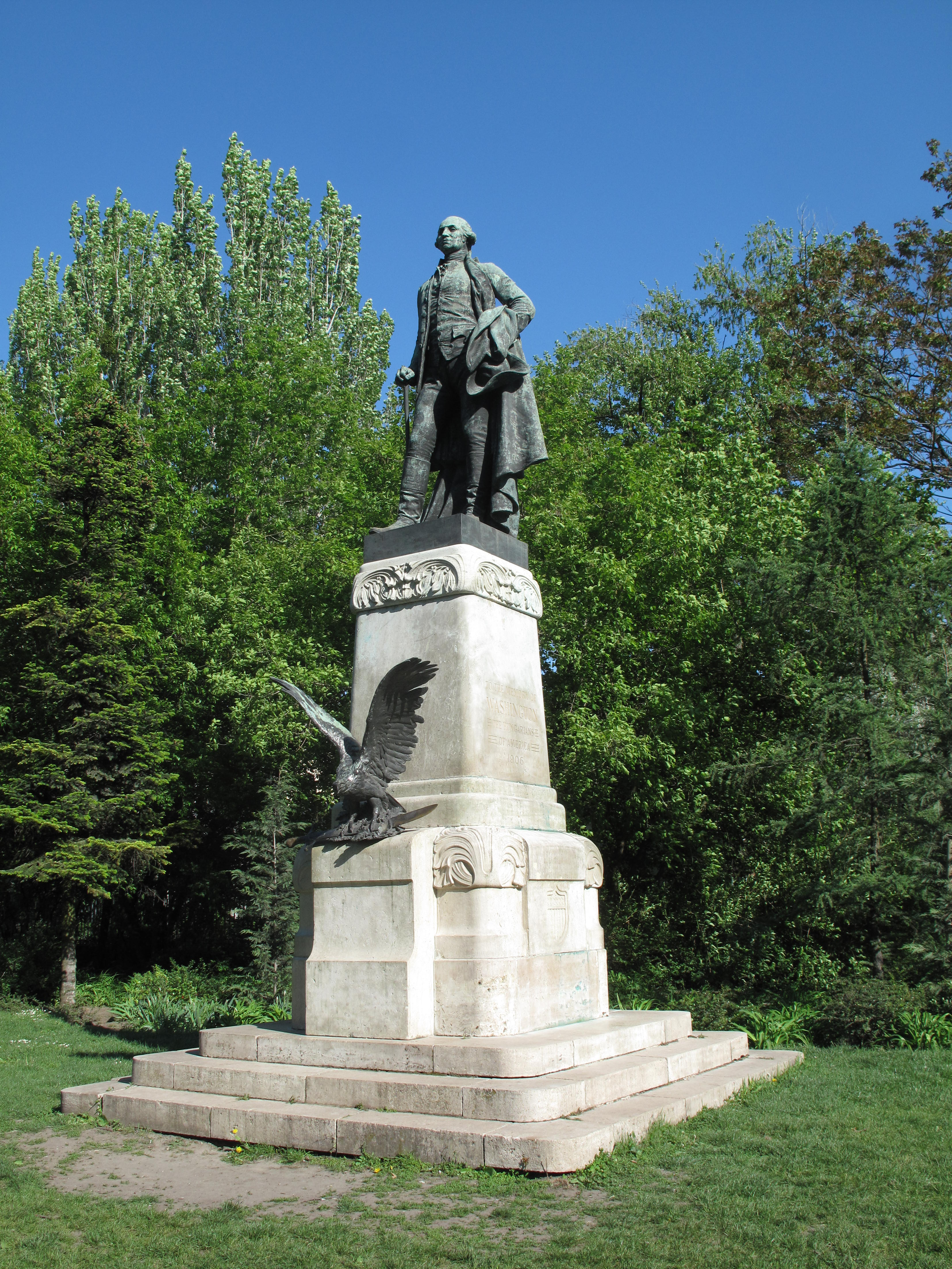 Budapešť